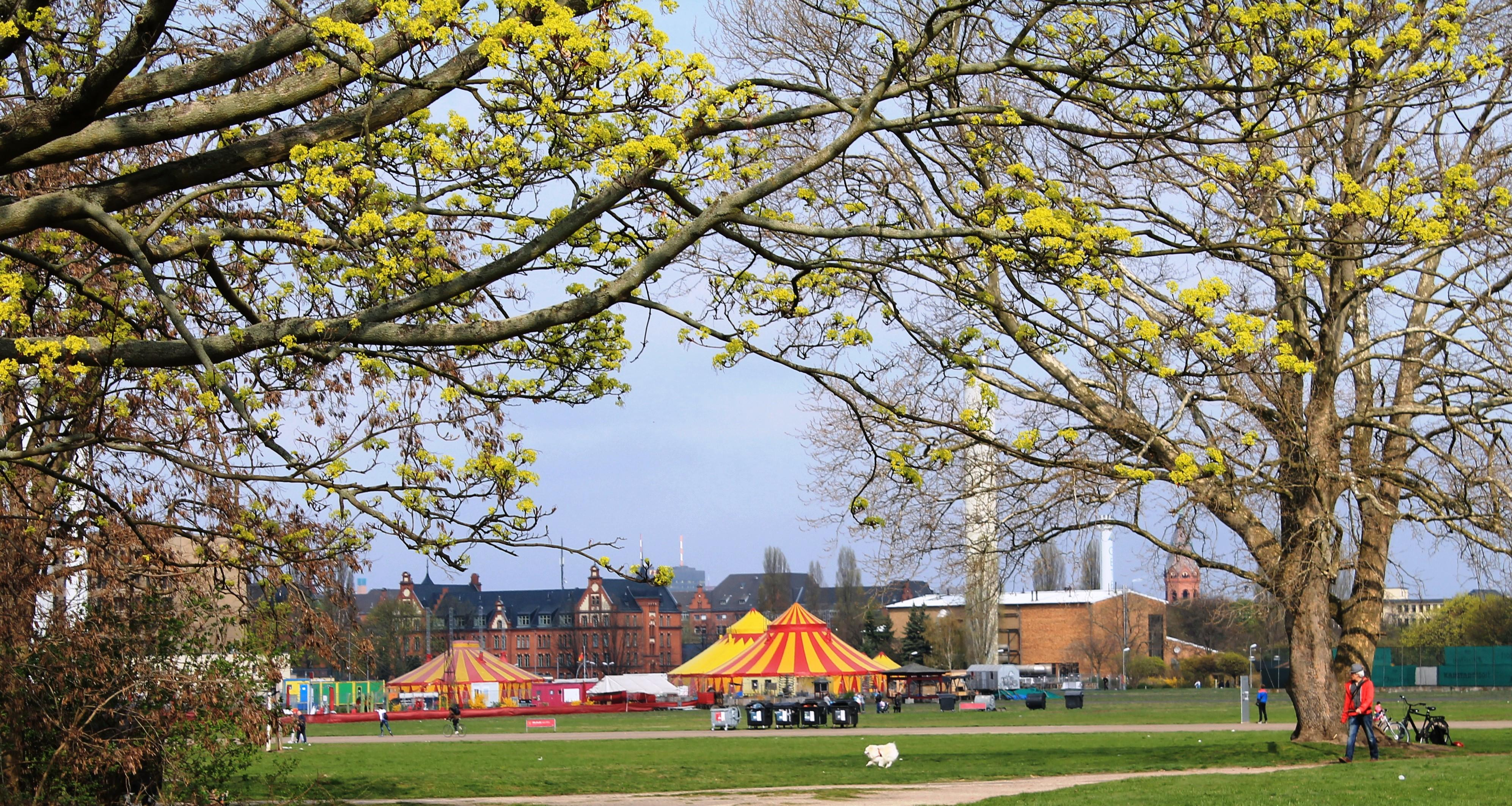 Blick über das Feld mit Kinderzirkus